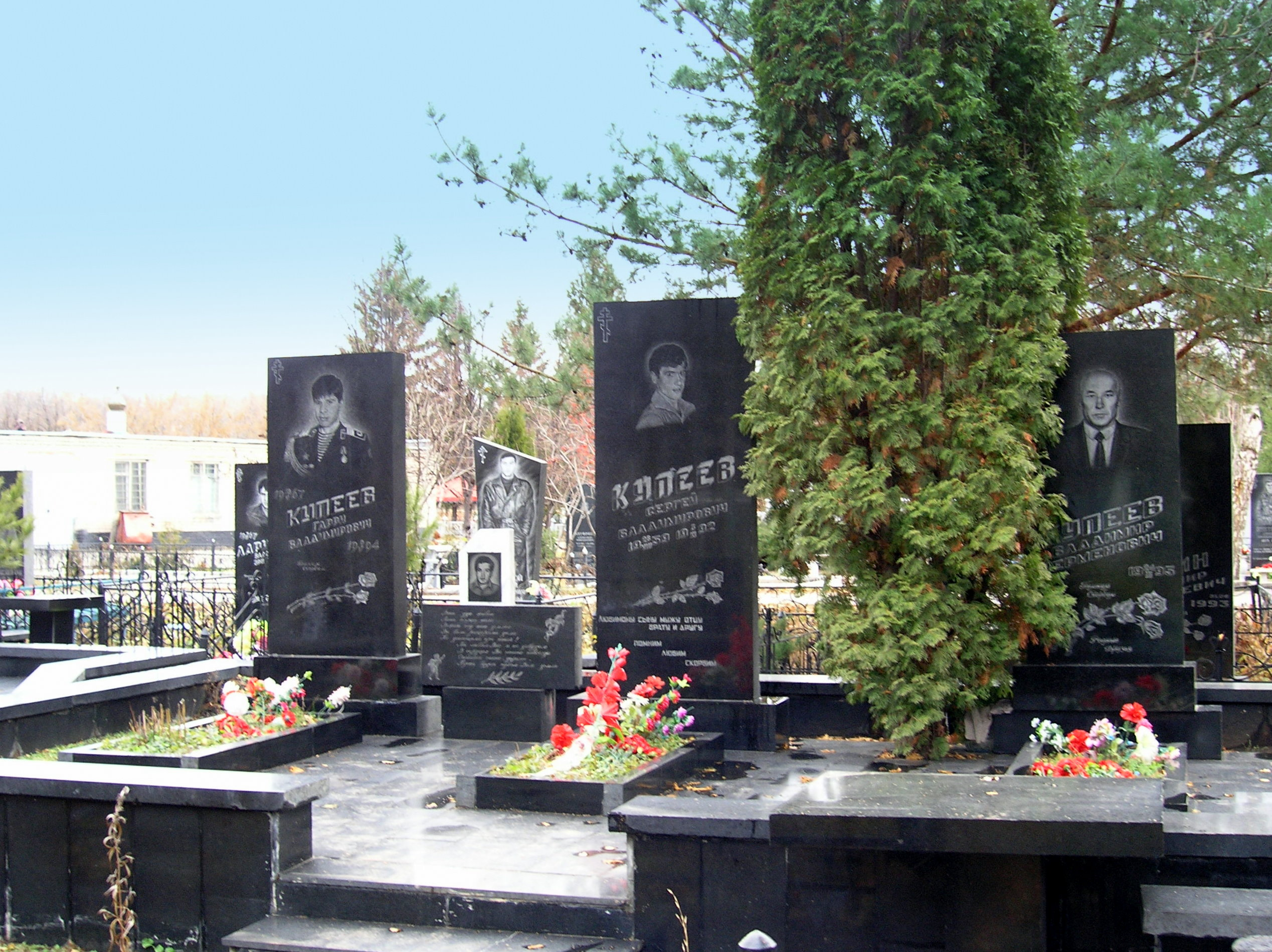 Могилы семьи Купеевых на "Аллее Героев". Баныкинское кладбище, Тольятти, Россия